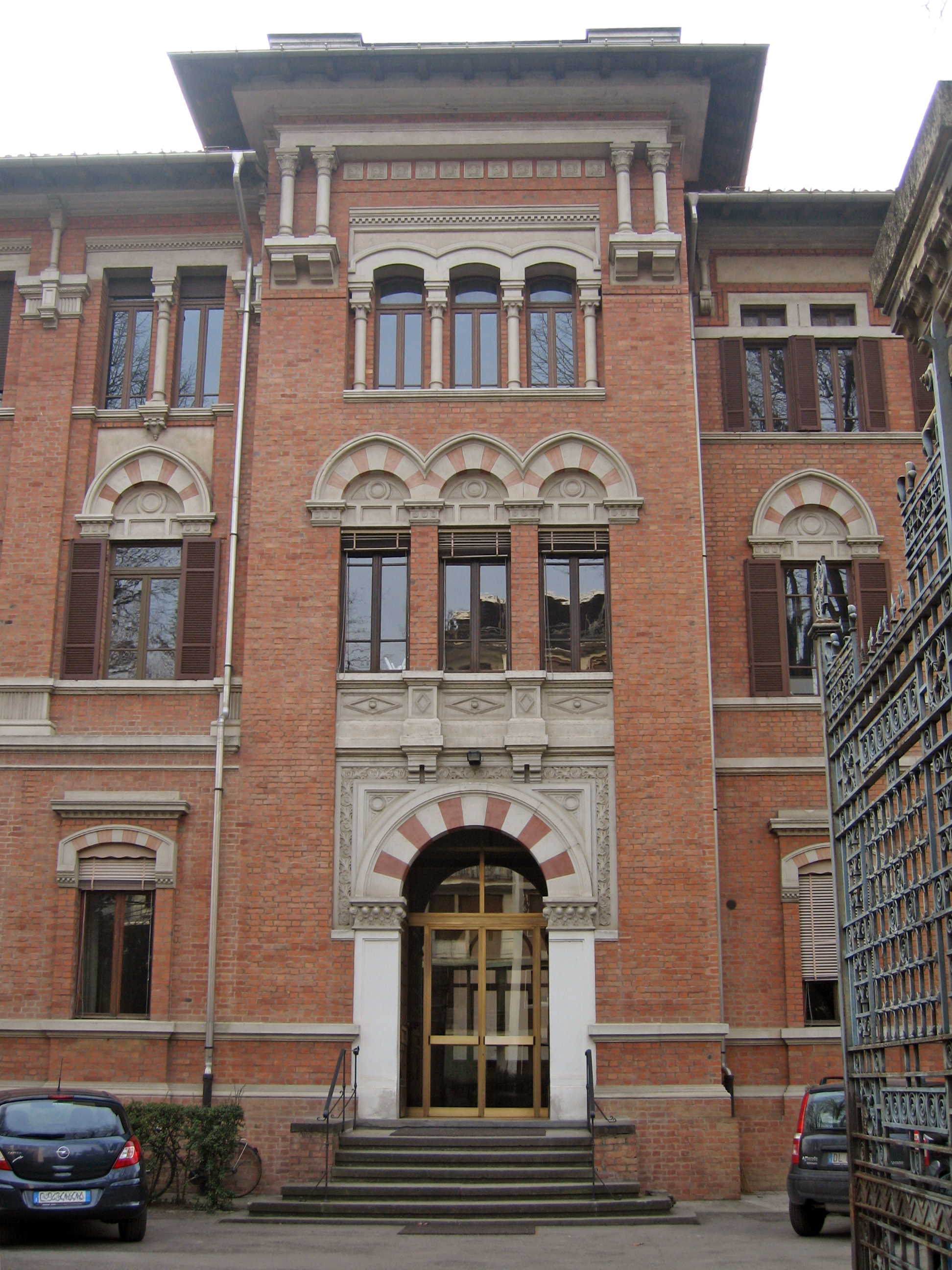 Seminario Minore (Parma) - torretta d'ingresso